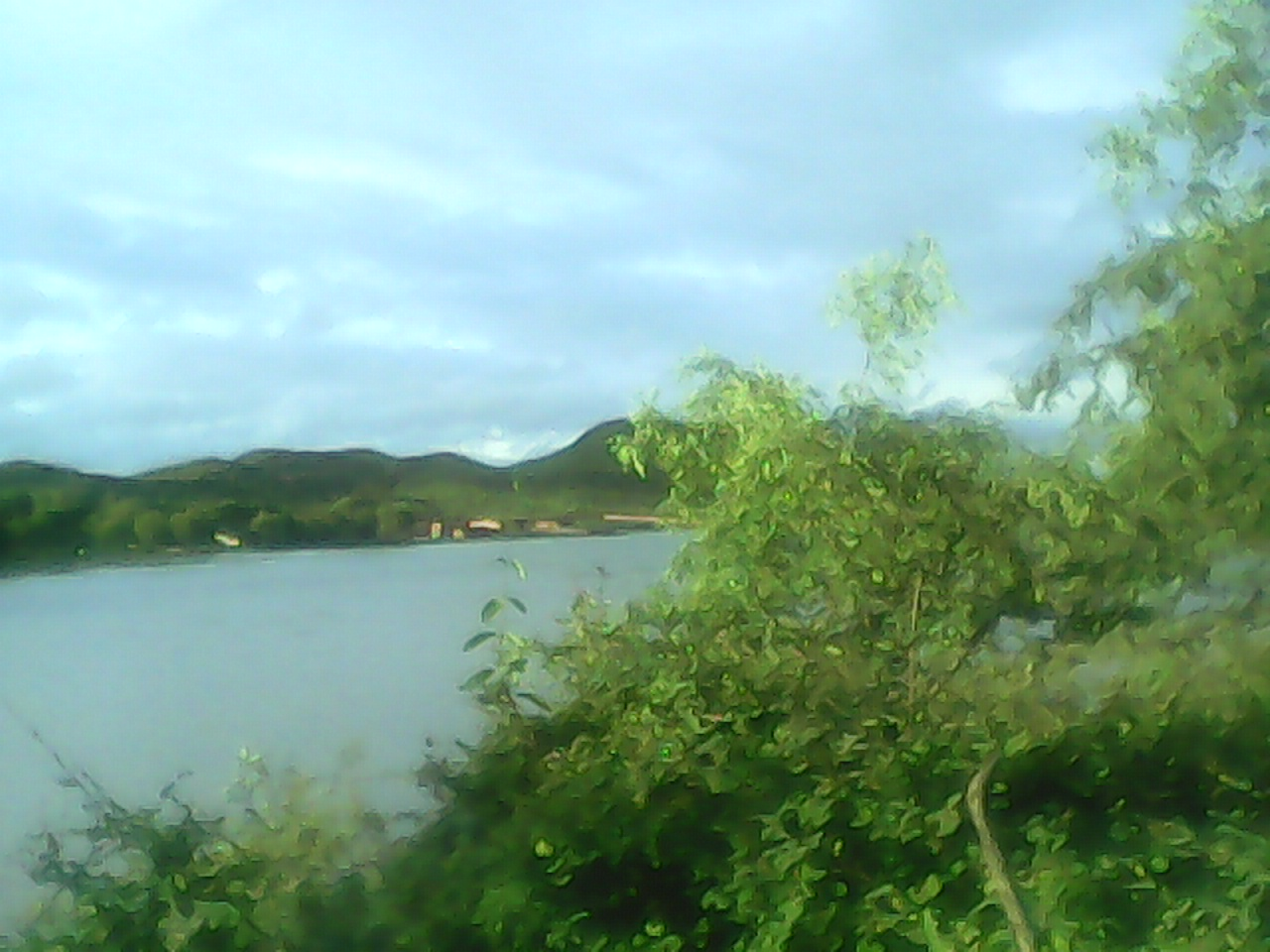 सौन्हर का तालाब, बरसात के बाद का दृश्य